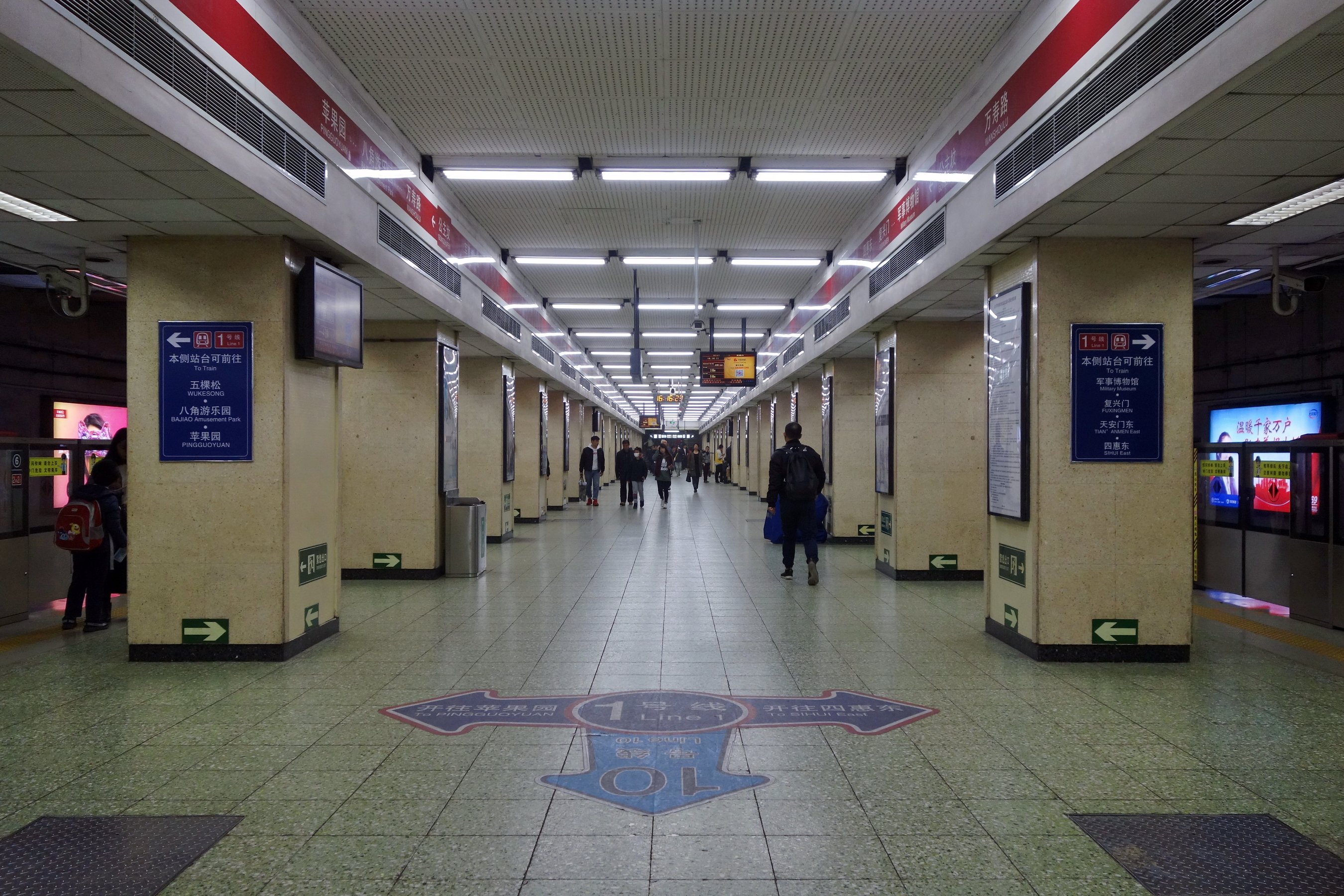 北京地铁1号线公主坟站岛式站台